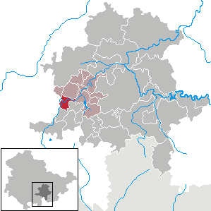 Mellenbach-Glasbach in Thuringia - District Saalfeld-Rudolstadt